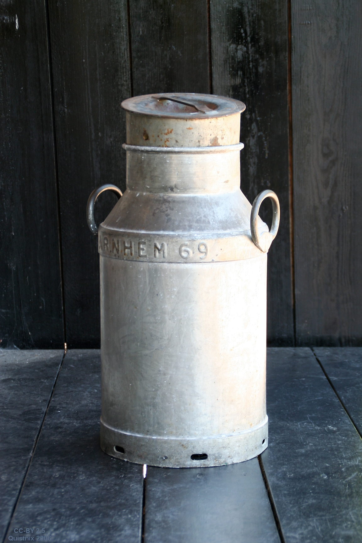 Melkbus in het openluchtmuseum te Arnhem. Eigen werk.